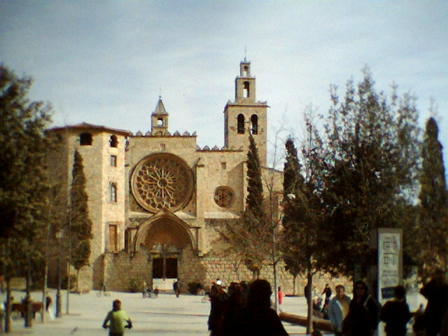 Monestir de Sant Cugat del Vallès. Monasterio de Sant Cugat del Vallès. Picture take it by Airunp